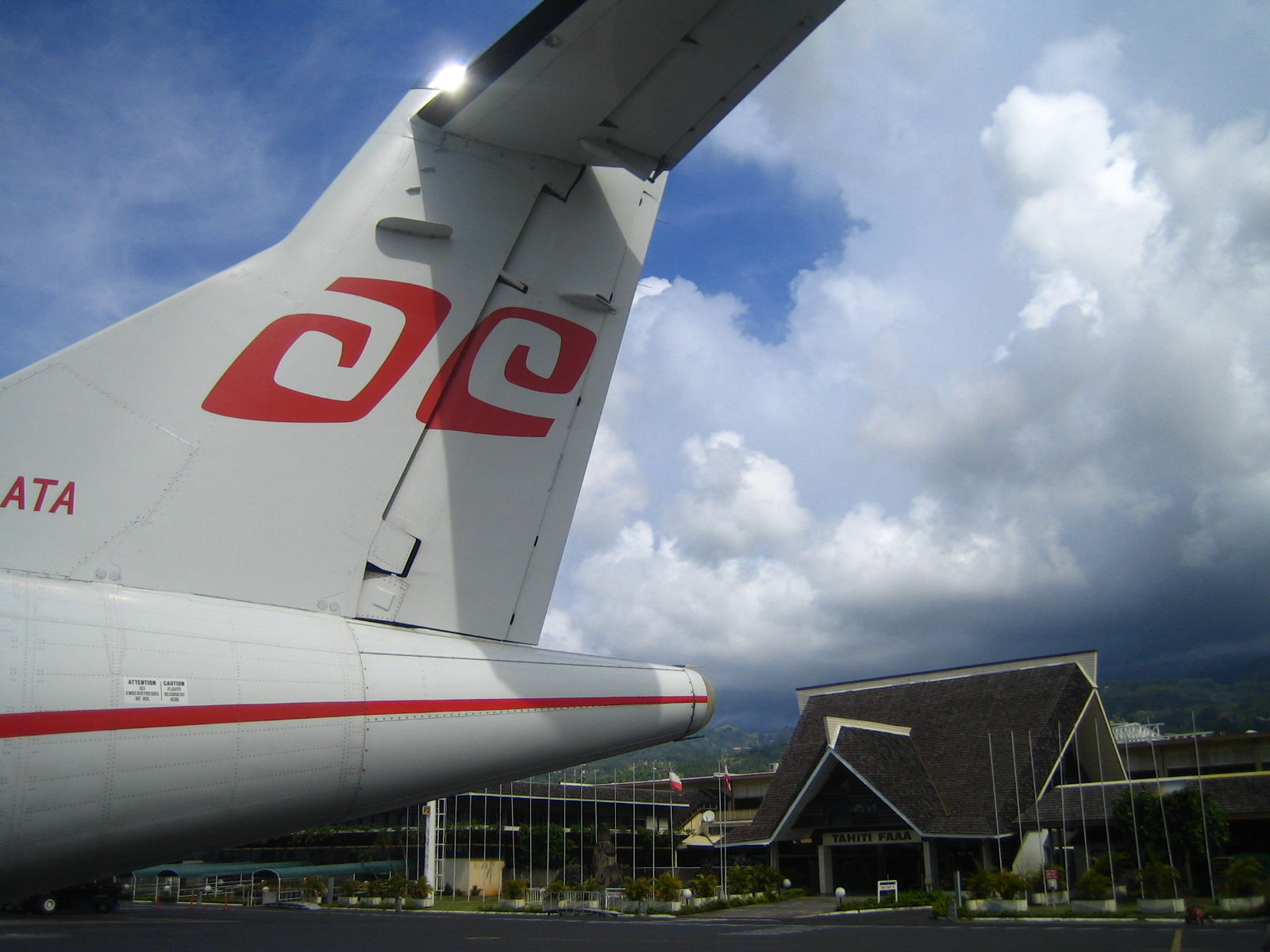 Air Tahiti à l'aérogare de Faaa (Photo personnel 2006) Utilisateur:FRED